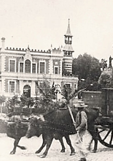 Castilo Dávila, al fondo a la izquierda, de lo que será tiempo más tarde, la Plaza Vicuña Mackenna.